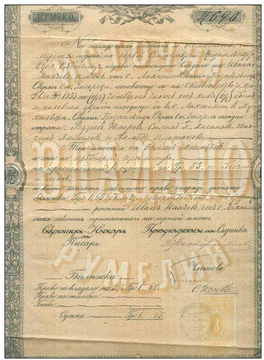 Владало (крепостен акт) за имот от село Лаханлии (днес Ветрен), Източна Румелия